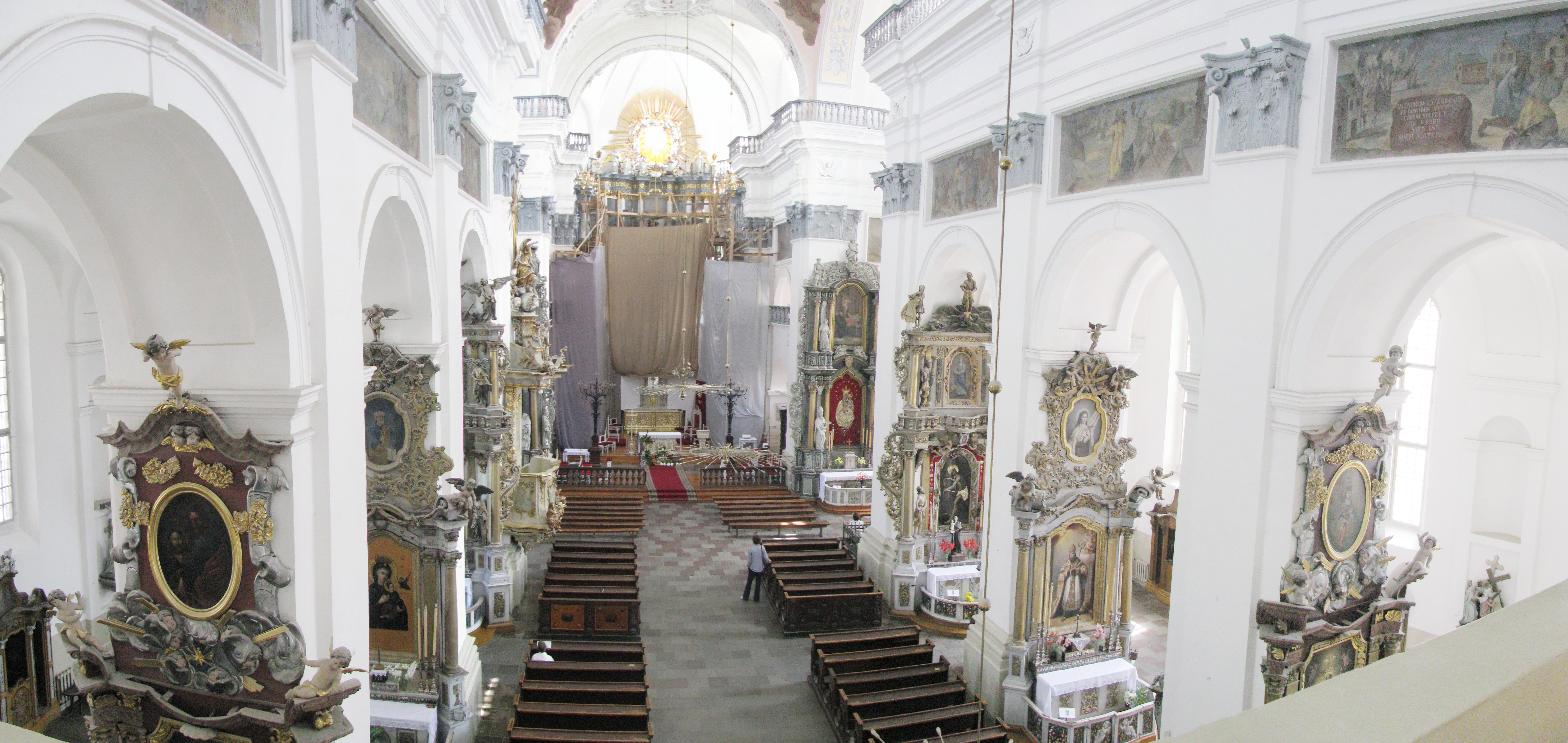 Беларуская (тарашкевіца): Ансамбль былога кляштара езуітаў:касьцёлдэкаратыўнае аздабленьне інтэр’ера касьцёла: галоўны алтар, 12 алтароў, амбон, 16 фрэскавых кампазіцый, фрэскі на парусах, росьпісы на падпружных арках, помнік на магіле А. Тызэнгаўза, арган, лаваў прэсбітэрыі, расьпісаная на тэмы жыційных сюжэтаў, два таршэры ў прэсбітэрыі, дзьве спавядальніжылыя карпусыаптэкаагароджа. г. Горадня This is a photo of Belarusian heritage monument. Reference number: 412Г000028 ( WLM)